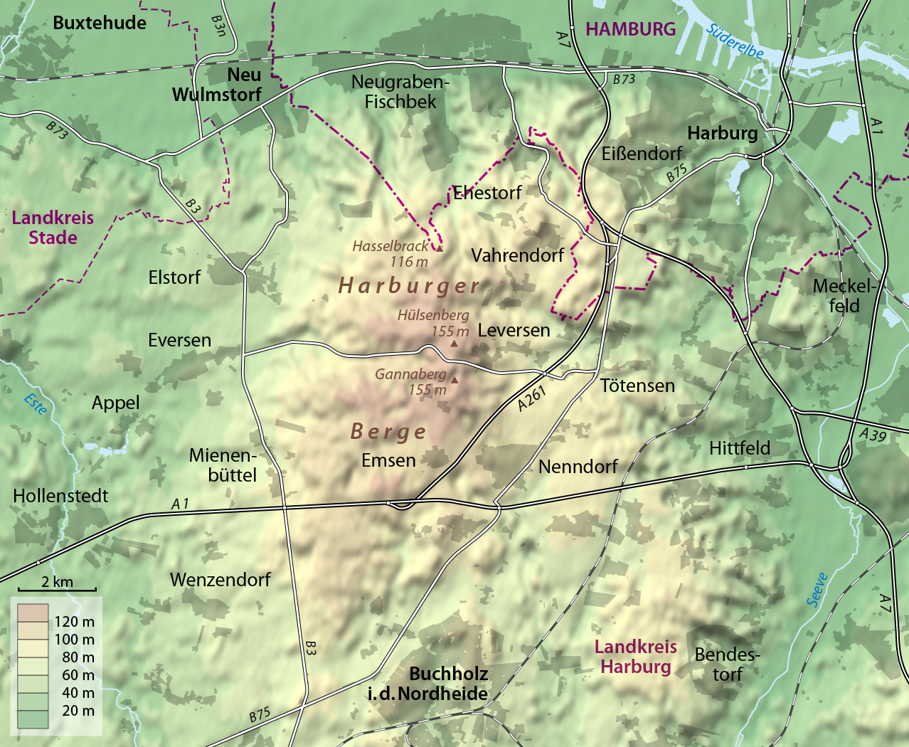 Karte der Harburger Berge This map may be incomplete, and may contain errors. Don't rely solely on it for navigation.